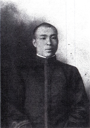 蒲田静三海軍大佐